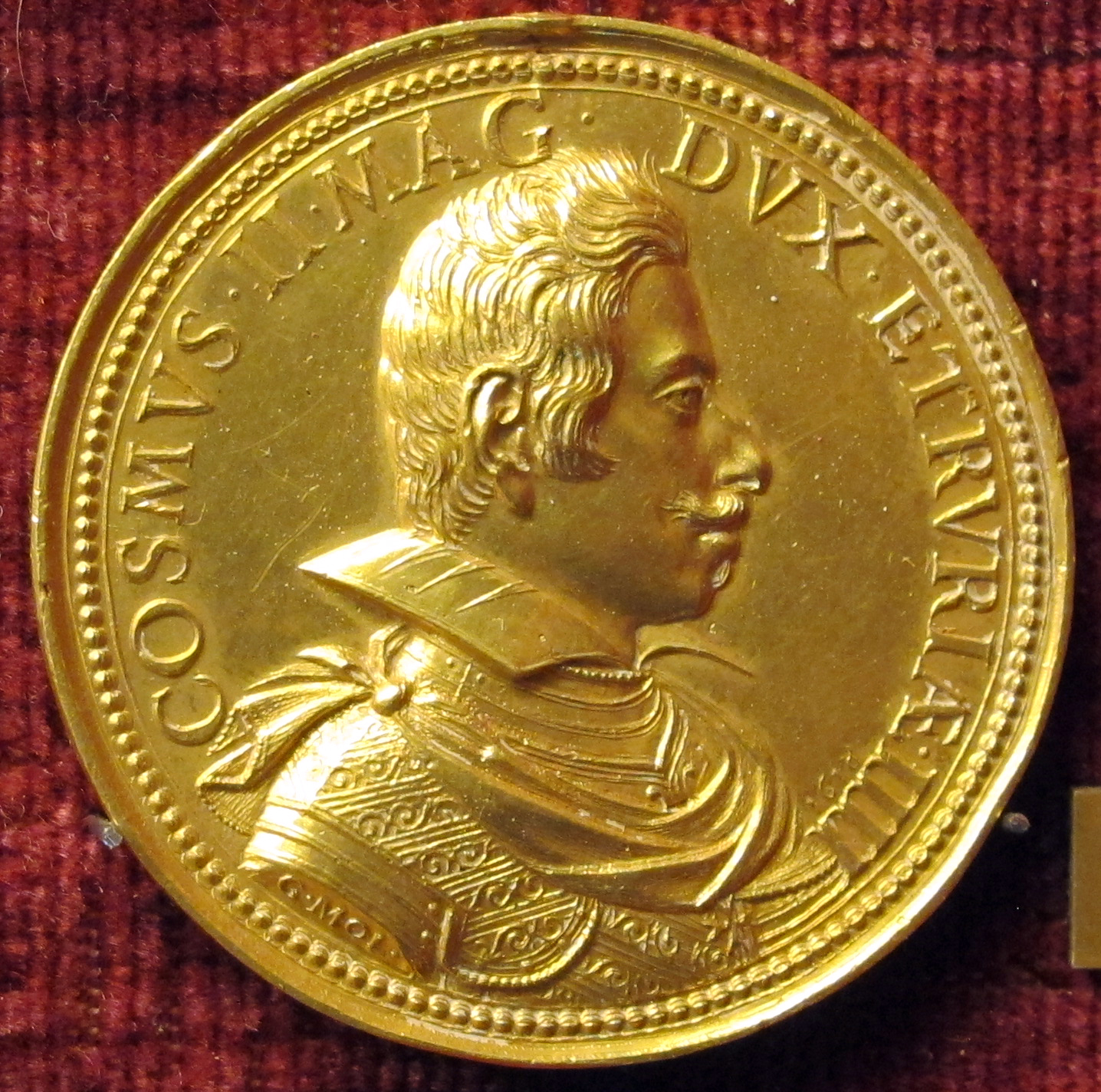 Medaglia di cosimo II de' medici (e maria m. d'austria), 1618